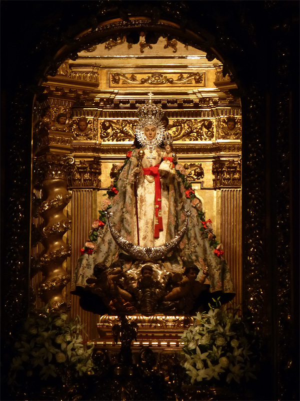 Santuario de la Fuensanta, Murcia, Región de Murcia, España.